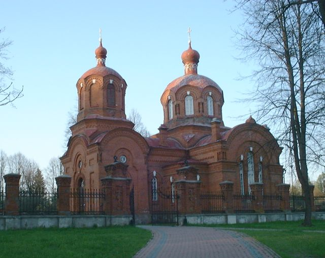 Poland, Bialowieża - Orthodox church.